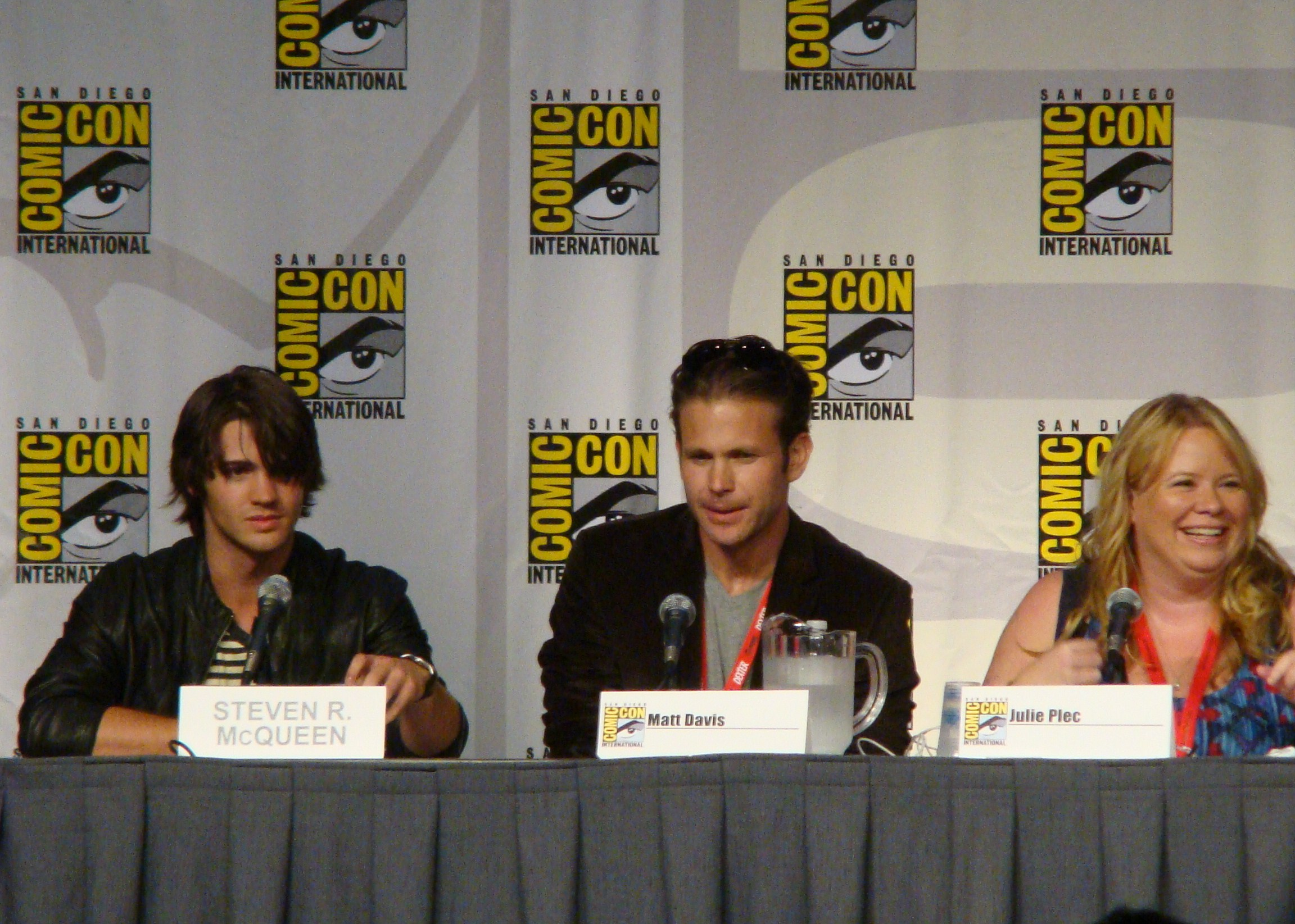 Steven R McQueen, Matt Davis & Julie Plec